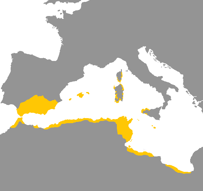 Idioma púnico (cartaginense)